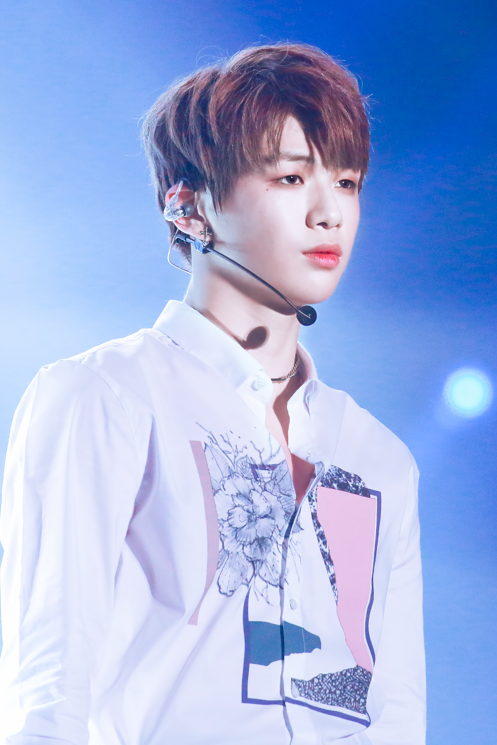 Kang Daniel during the Wanna One Premiere Show Concert on August 7, 2017.